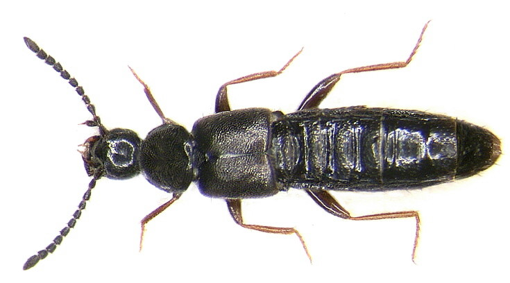 Familie: Staphylinidae Grösse: 4-4,5 mm Verbreitung: Europa Ökologie: an nassen Stellen und im Genist Fundort: Germania, Bayern, Deggendorf leg.det. U.Schmidt, 1978 Foto: U.Schmidt, 2005